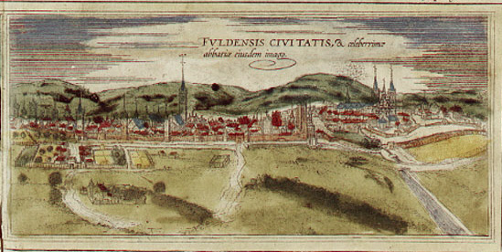 Fulda